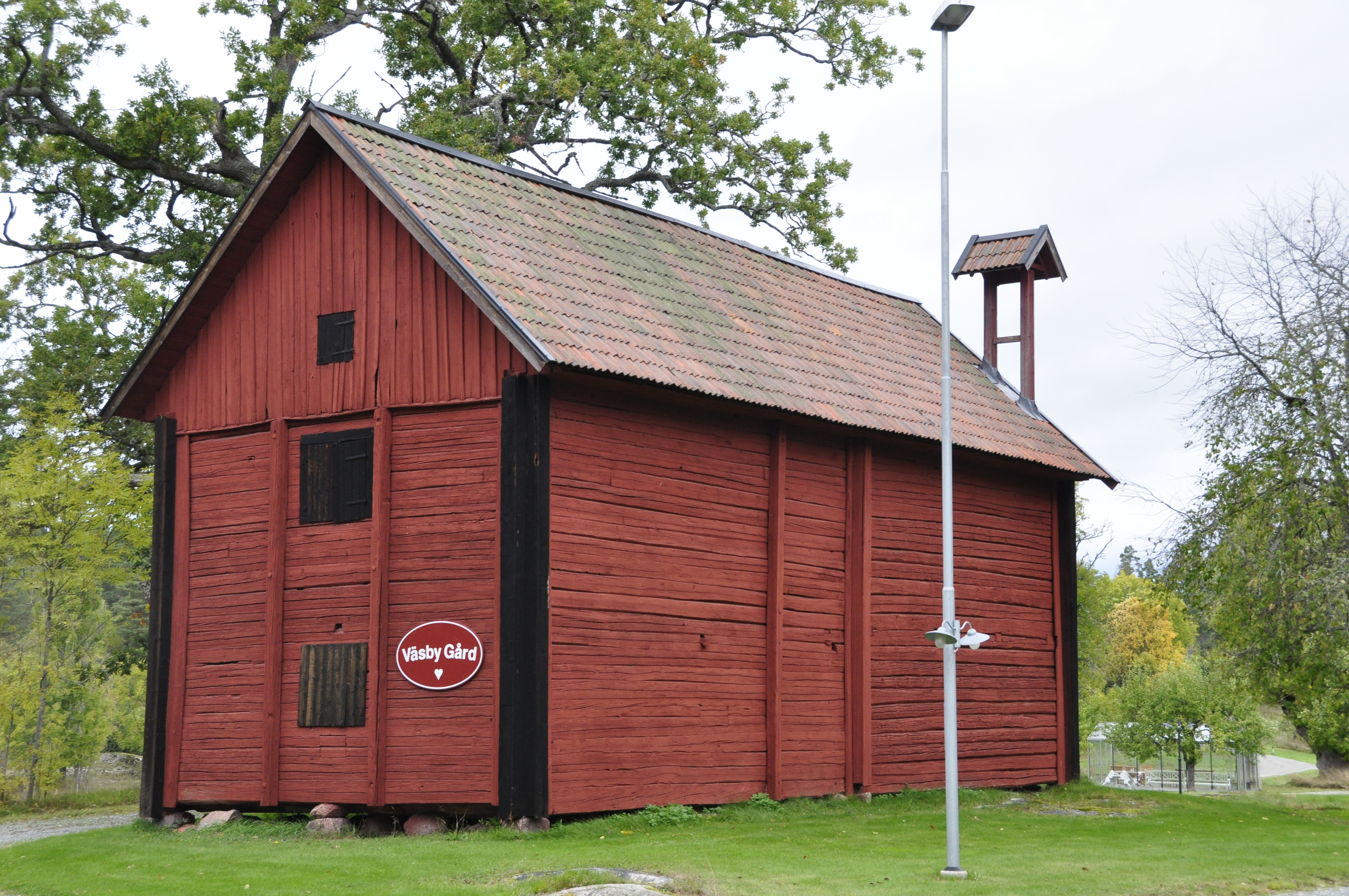 Sädeslada, Våsby gårdm, Ljusterö.